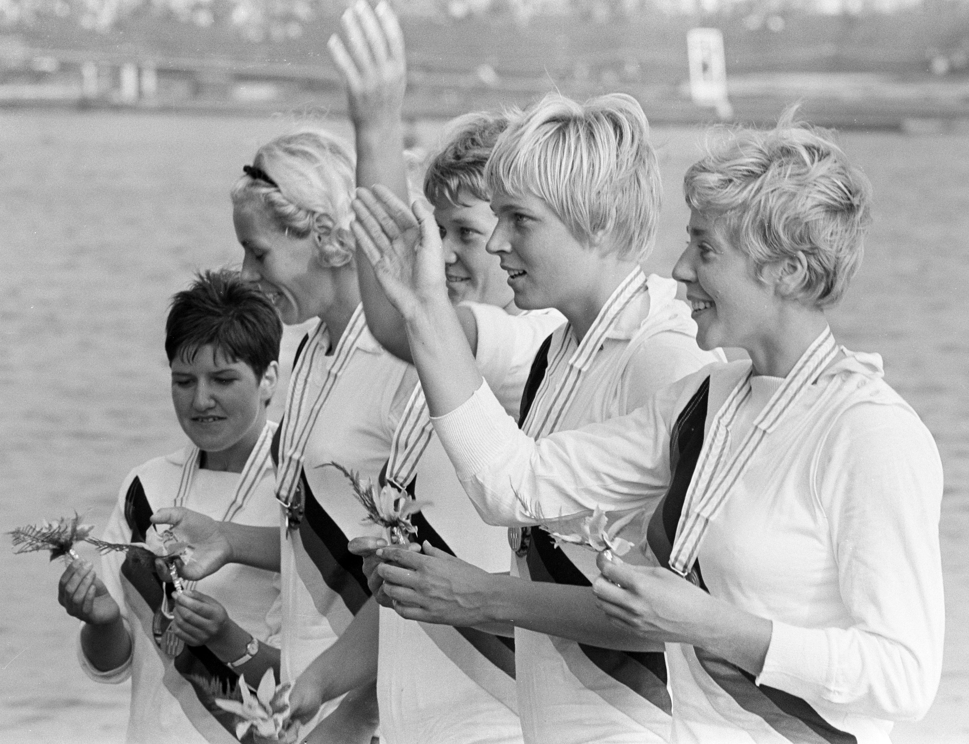 Europese Roeikampioenschappen dames 1966, Oost-Duitse dubbel-vier. ID